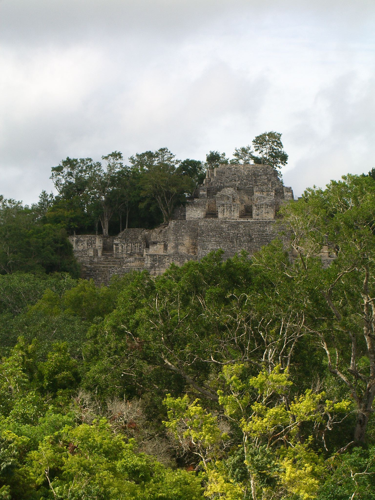 Zona arqueológica de Calakmul.